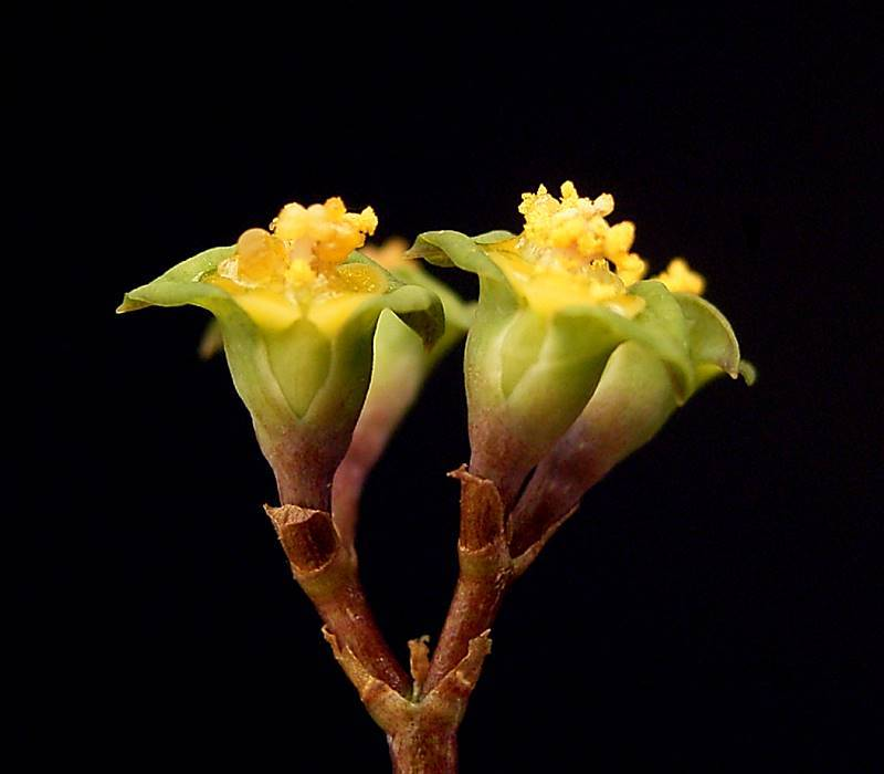 Euphorbia neobosseri